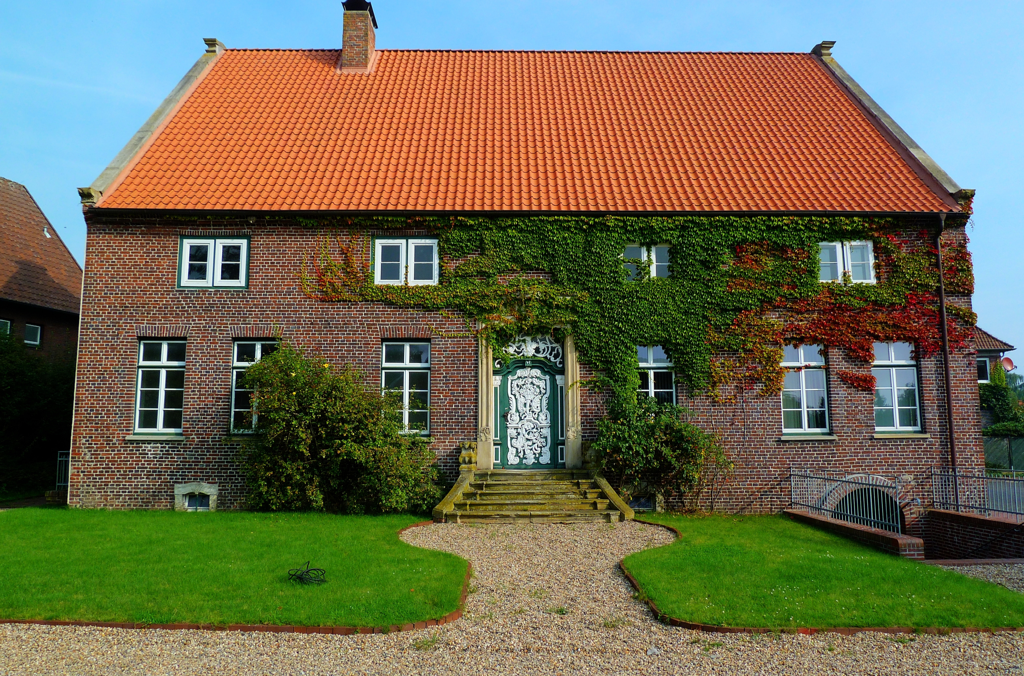 Hemkensche Kaufmannshaus mit Rokokotür von 1754 in Bockhorn